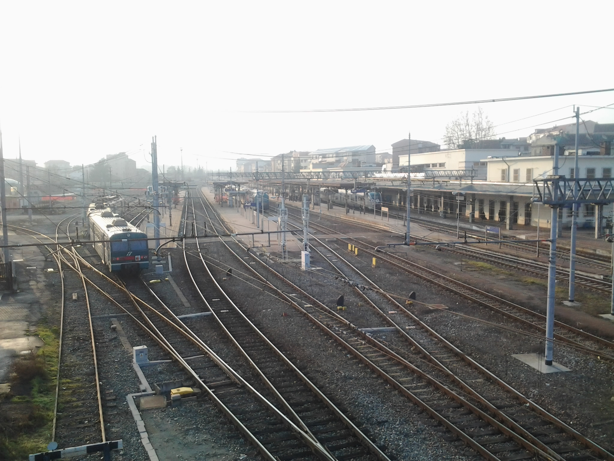 stazione ferroviaria di Asti - vista aerea sui binari